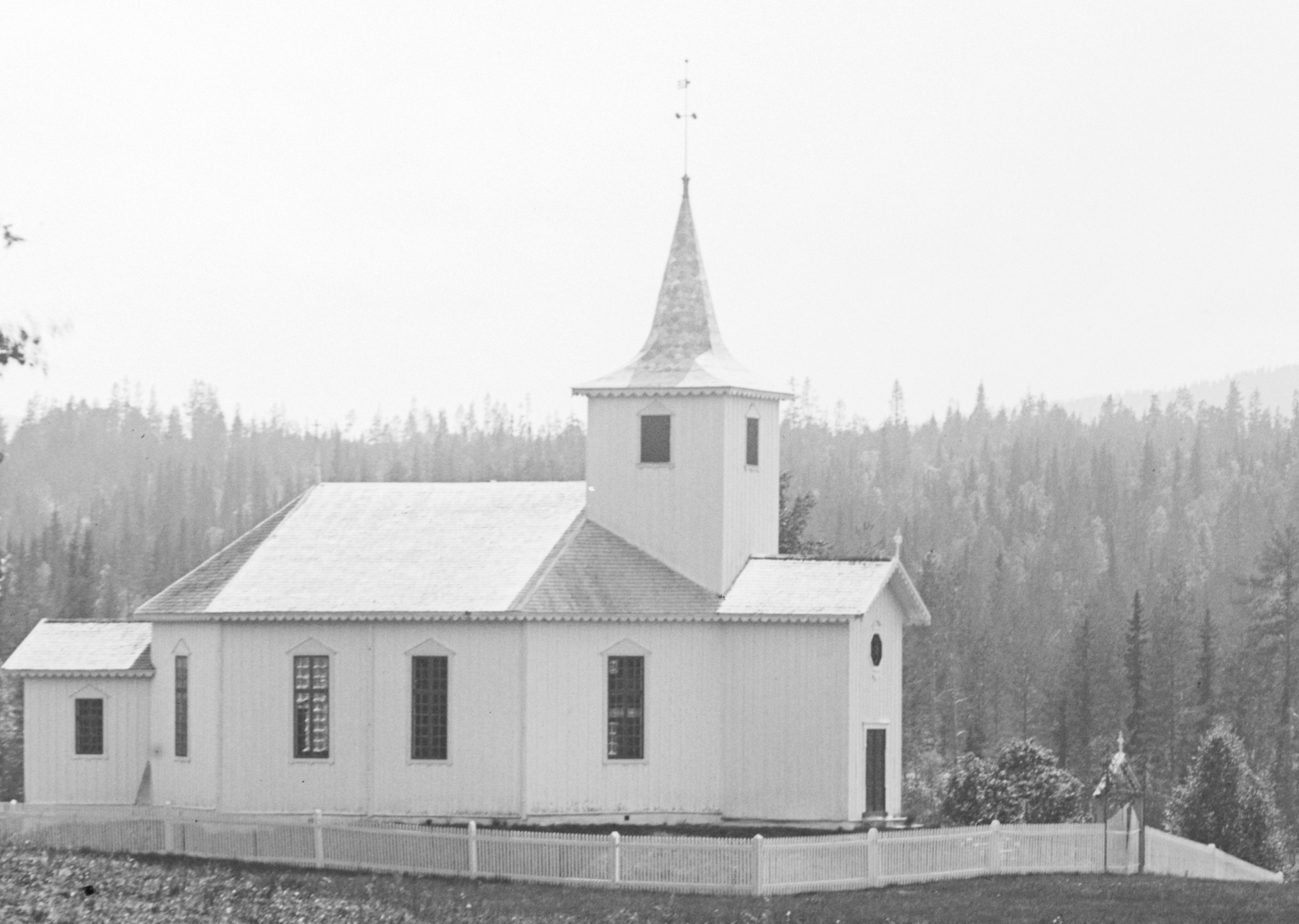 Plassen gamle kirke (vigslet 1879, brant 1904). Arkitekt: Jacob Wilhelm Nordan.